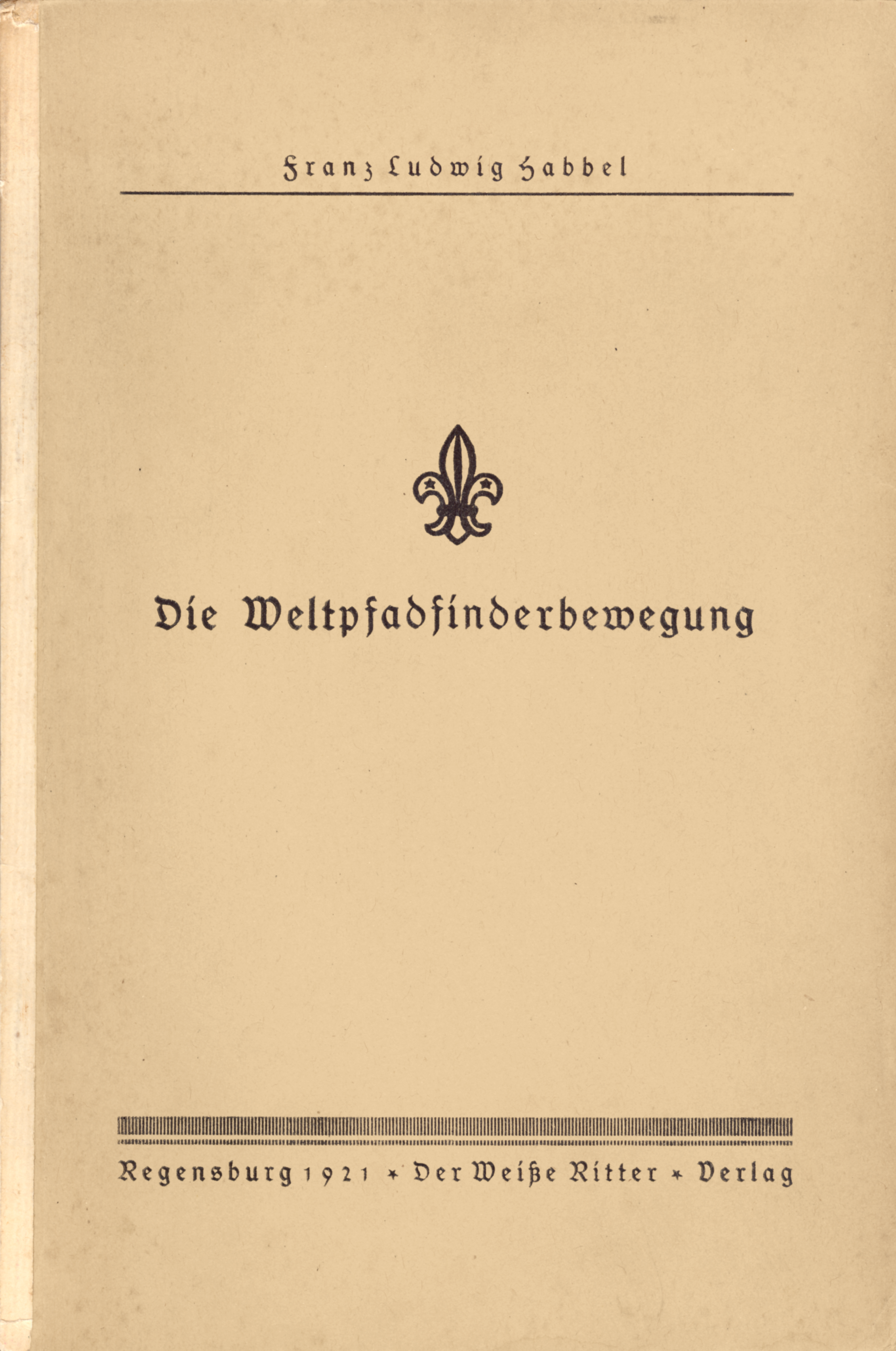 Franz Ludwig Habbel: Die Weltpfadfinderbewegung. Der Weiße Ritter Verlag, Regensburg 1921 (Sonderdruck aus dem Heft 2/21 „Heimat und Welt“ der Führerzeitschrift des Bundes Deutscher Neupfadfinder „Der weiße Ritter“).